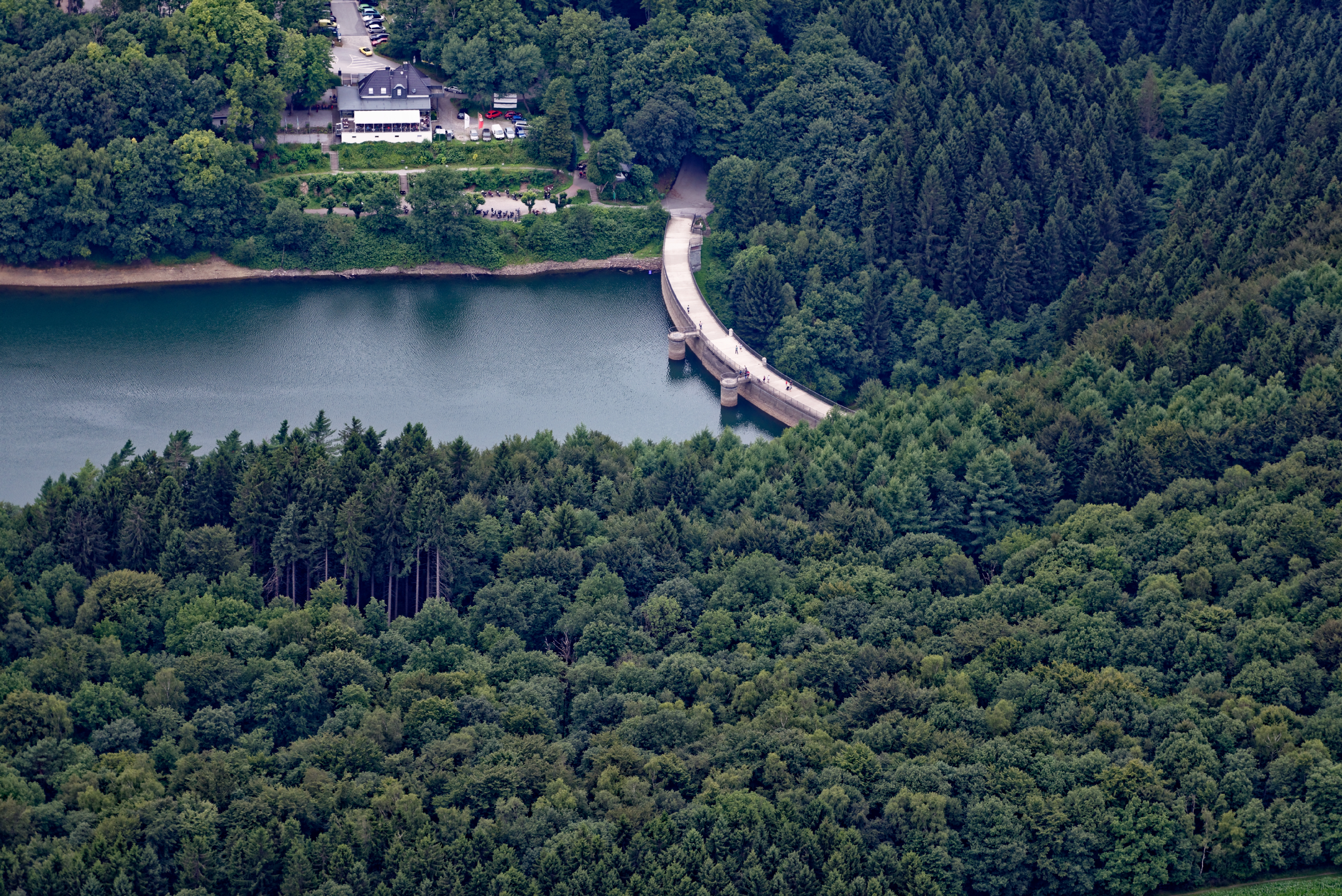 Luftaufnahme der Staumauer der Glörtalsperre im Bereich der Gemeinden Breckerfeld und Schalksmühle